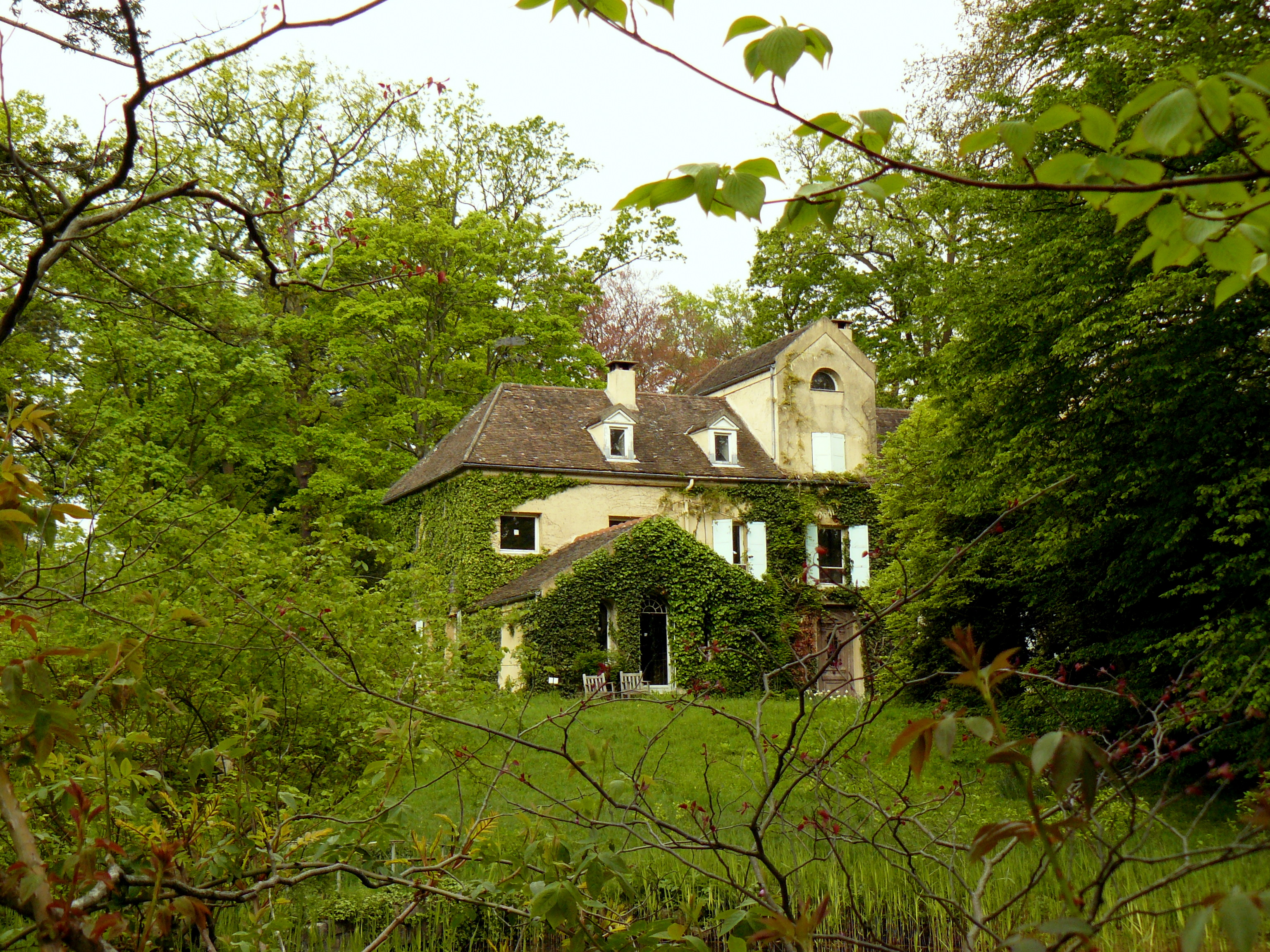 Vue du domaine de L'Ile Verte à Châtenay-Malabry (Hauts-de-Seine, France), aujourd'hui parc public.